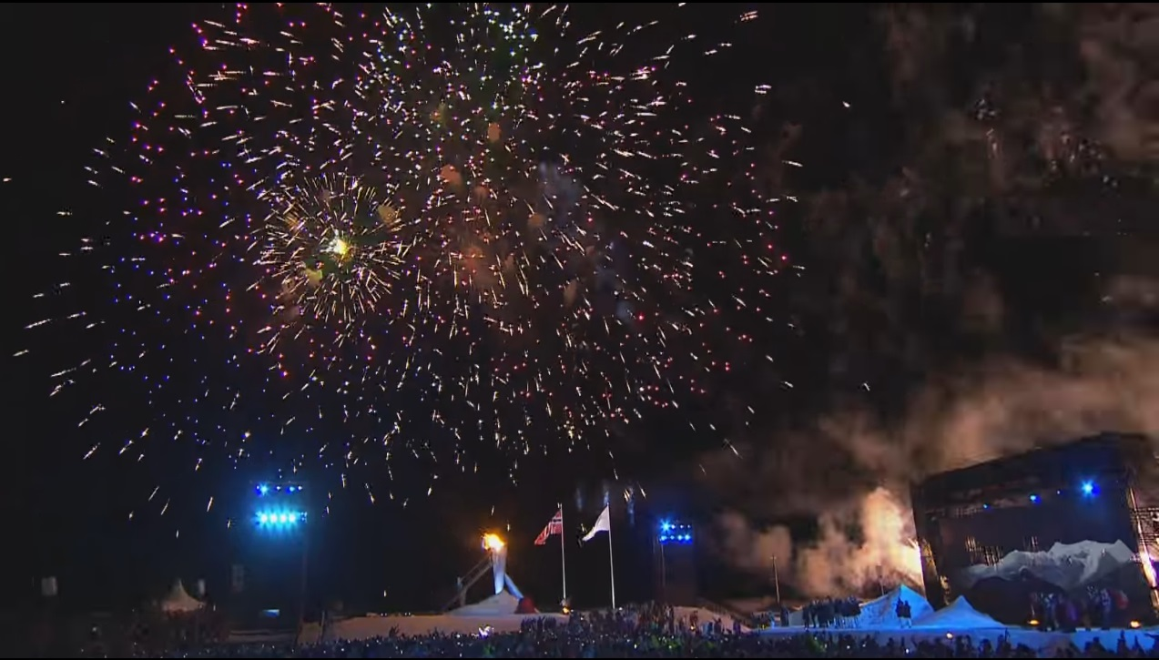 Inauguración de los Juegos Olímpicos de Invierno de la Juventud de 2016.